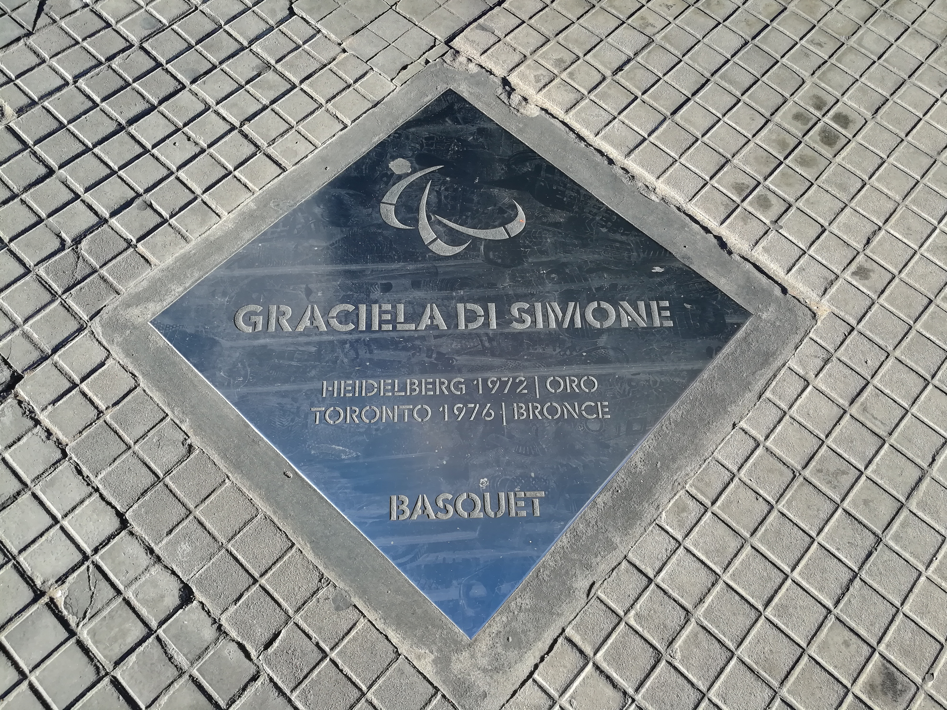 Paseo de los Olímpicos de los en la Avenida Pellegrini (Rosario).